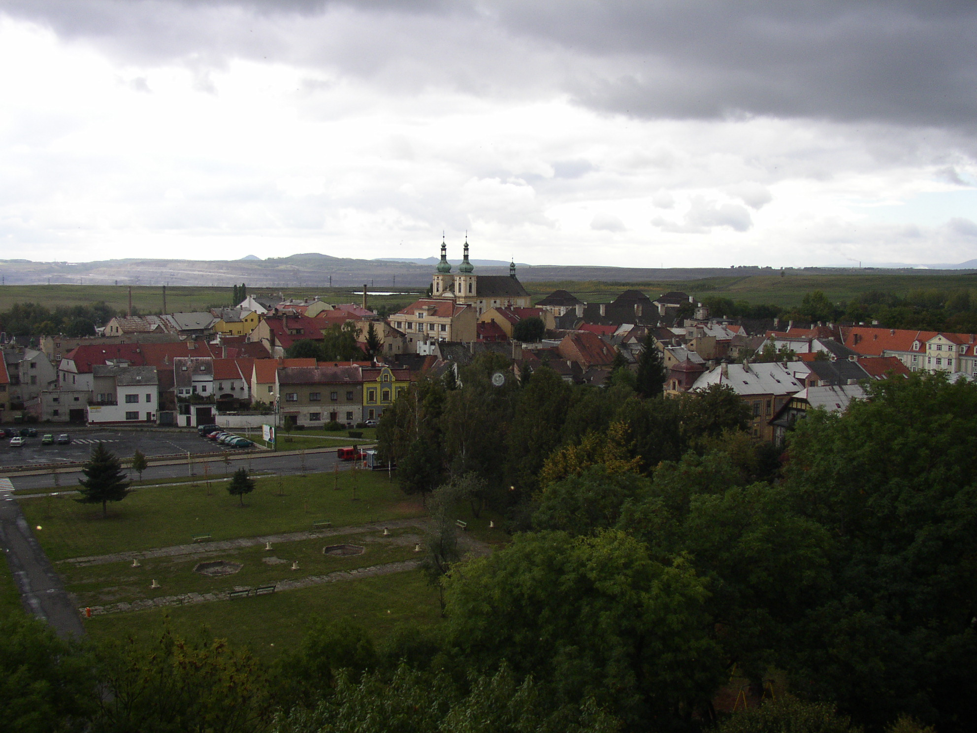 Duchcov, okres Teplice, Česká republika